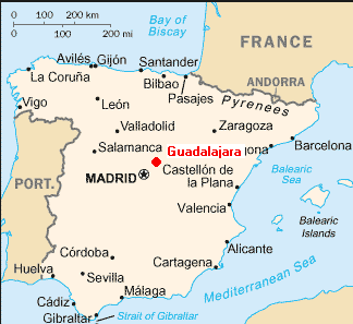 Lage von Guadalajara in Spanien